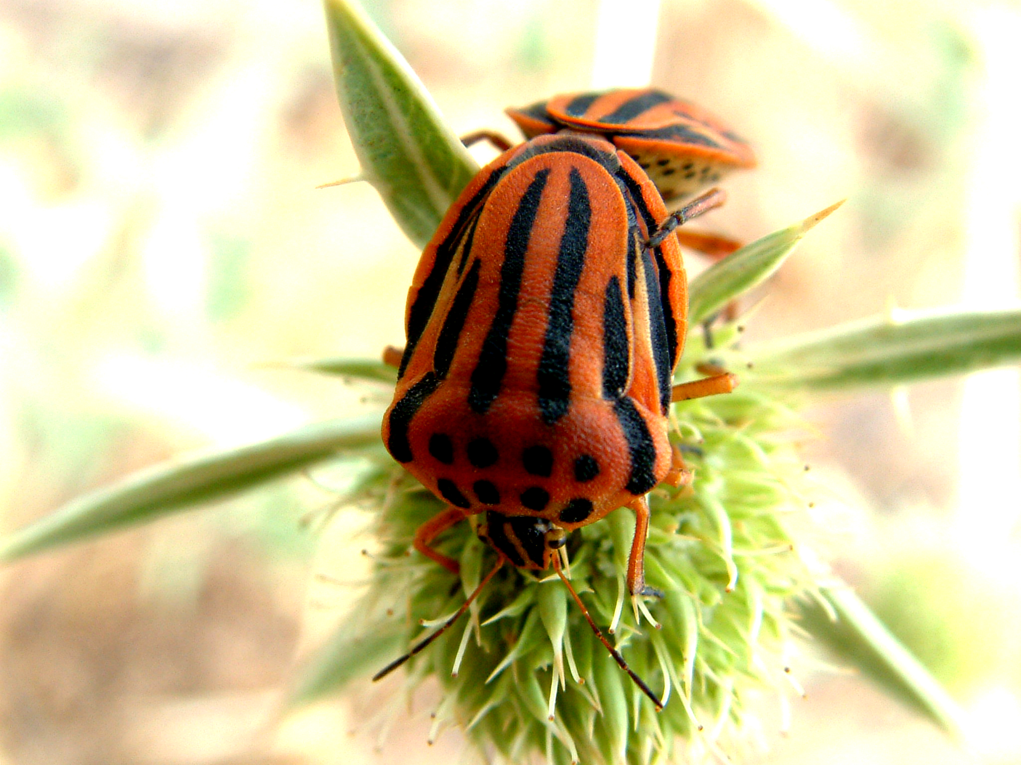 Streifenwanze, True bug